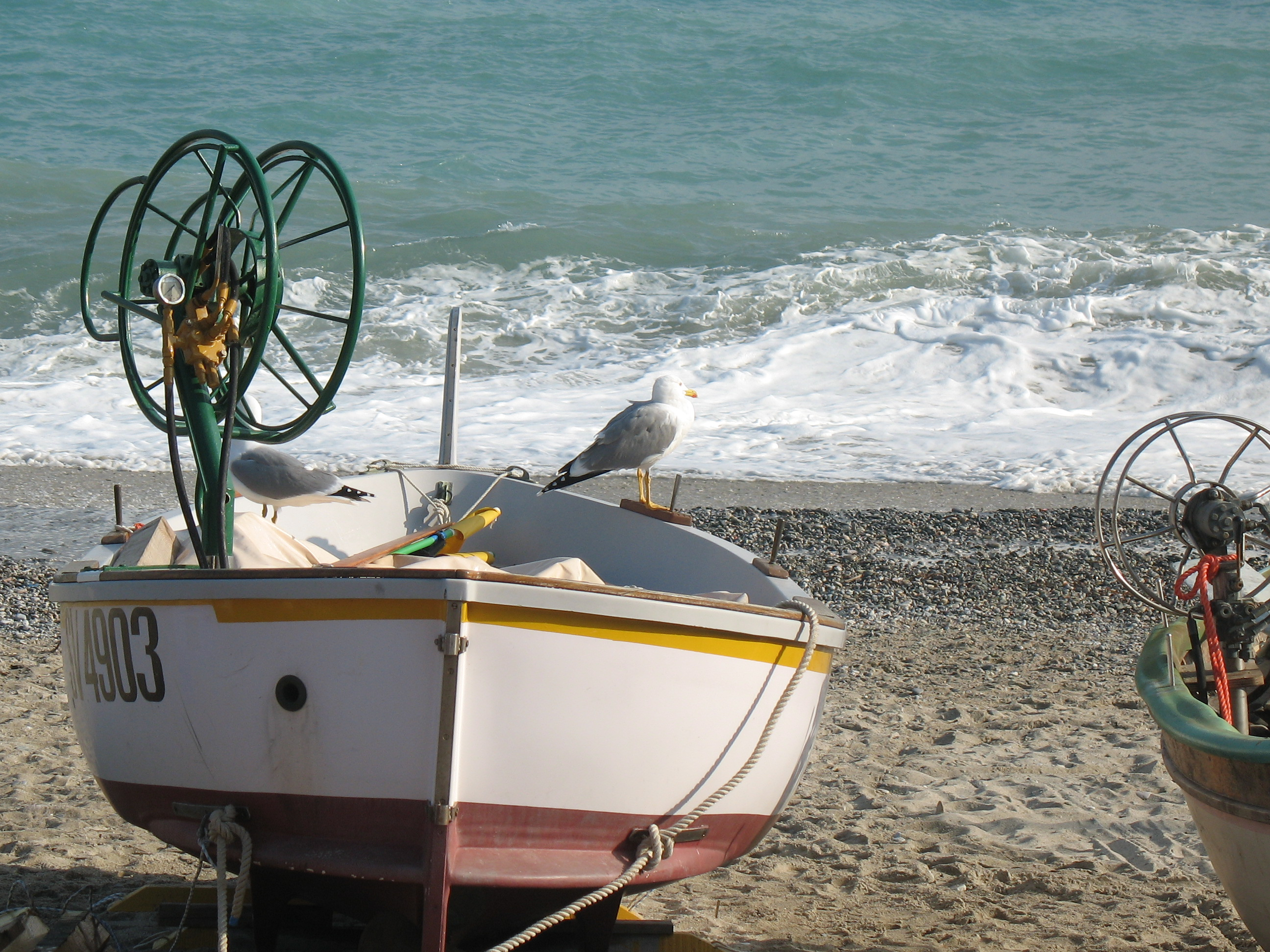 Serie di Immagini da Noli in provincia di Savona